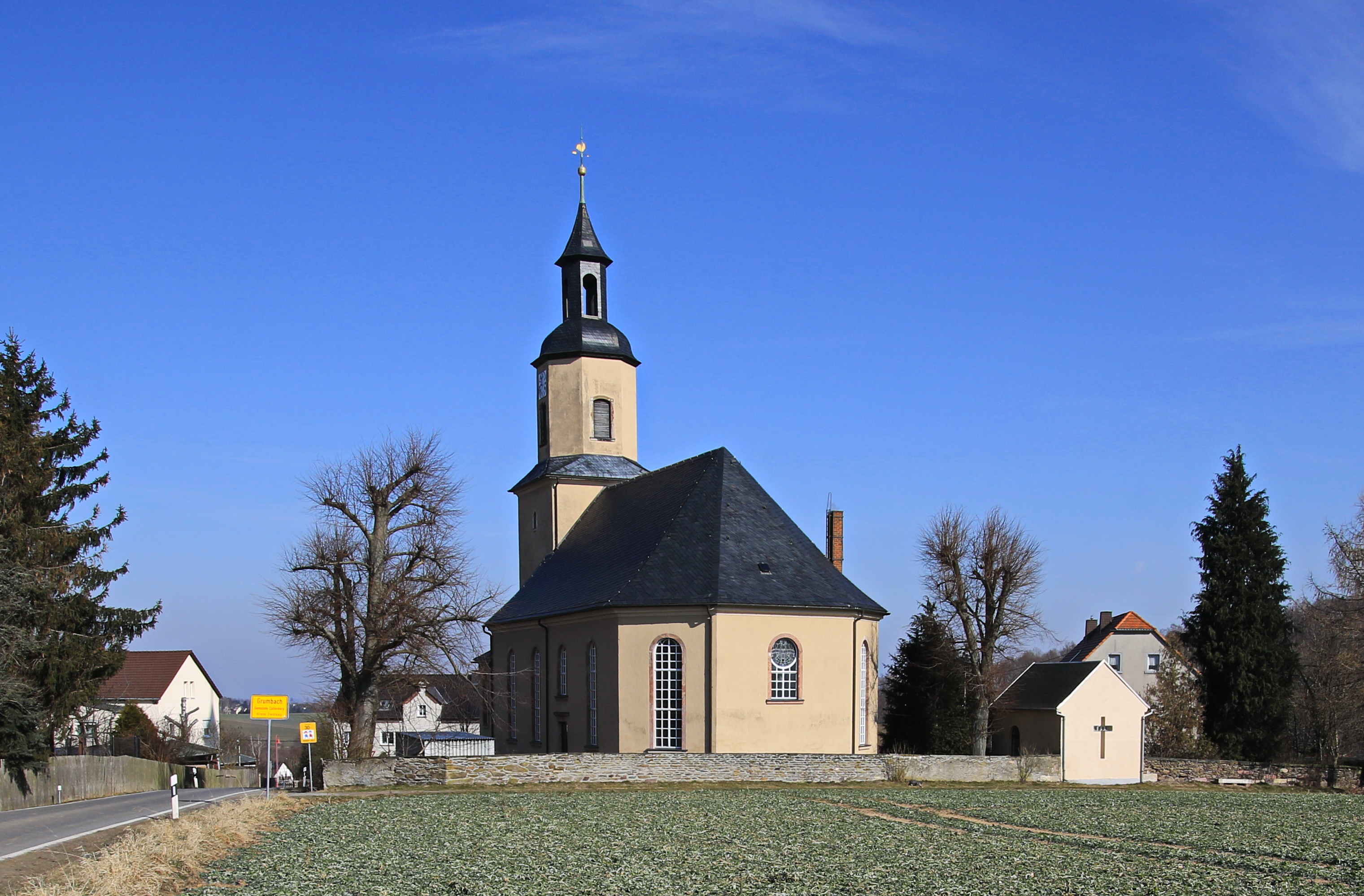 Kirche in Grumbach bei Callenberg in Sachsen.